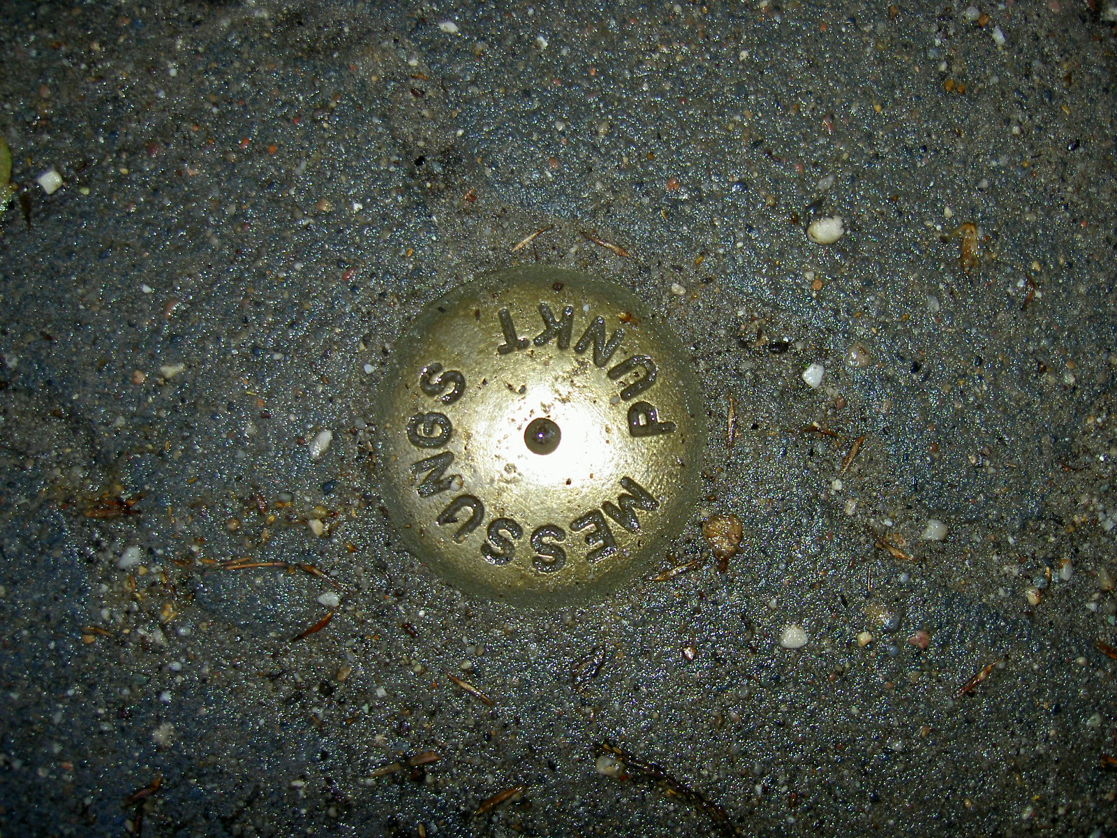 Messpunkt in Berlin (Berliner Mittelpunkt) N 52° 30.092 E 013° 24.137 UTM: 33U E 391549 N 5818022